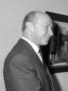 Title: Bundesrat, Empfang Leiter der Ständigen Vertretung People in the image: Engholm, Björn: Ministerpräsident von Schleswig-Holstein, SPD, Bundesrepublik Deutschland * Neubauer, Horst: Leiter der Ständigen Vertretung in der Bundesrepublik Deutschland, DDR Factual corrections and alternative descriptions are encouraged separately from the original description. Additionally errors can be reported at this page to inform the Bundesarchiv. Original historic description: Bonn, 6. März 1989 Bundesratspräsident Björn Engholm (r.) empfing den Leiter der ständigen Vertretung der Deutschen Demokratischen Republik, Horst Neubauer, zu einem Meinungsaustausch im Bundesrat.